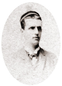 Porträt von Hugo Rex (* 1861, + 1936)